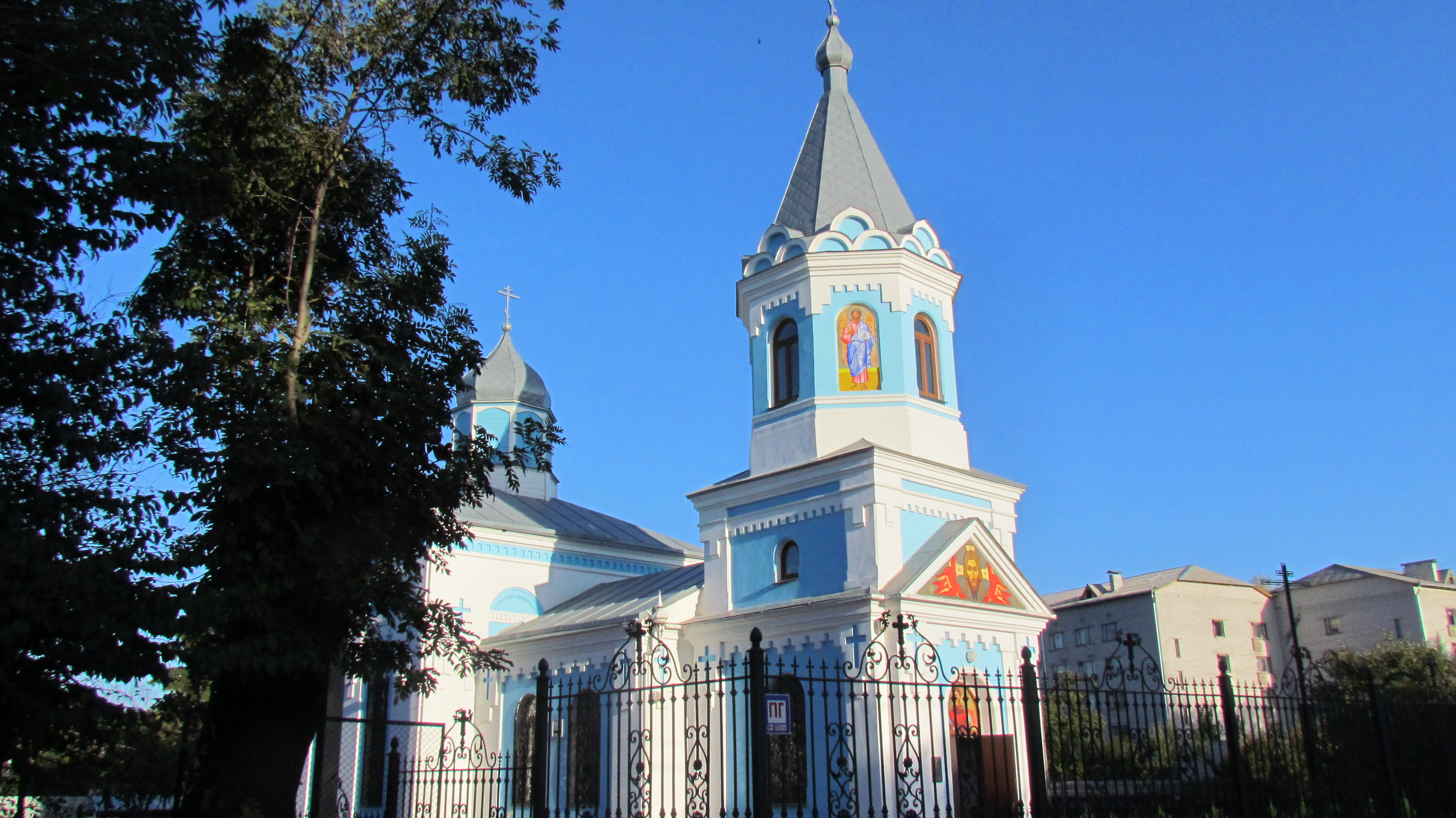 Церква Покрова Богородиці на Крошні, Житомир, вул. Щорса, 98